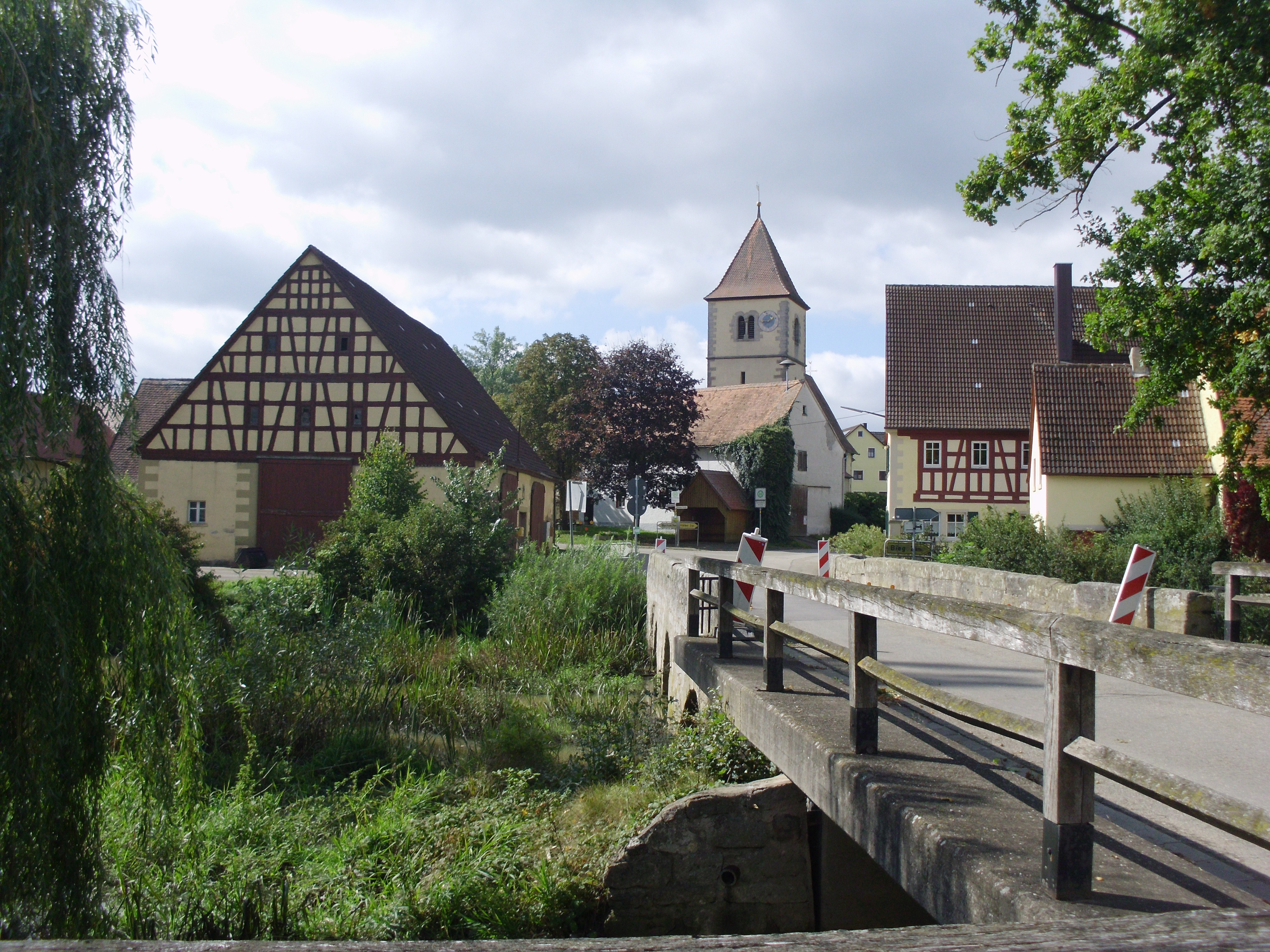 Frommetsfelden, Ortsteil von Leutershausen im mittelfränkischen Landkreis Ansbach